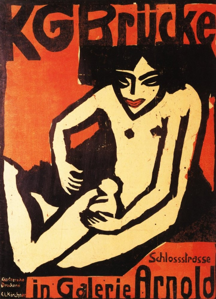 Ernst Ludwig Kirchner, cartel de presentación para una exposición de Die Brücke en la Galería Arnold de Dresde (1910)